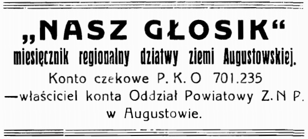 "Nasz Głosik" - reklama